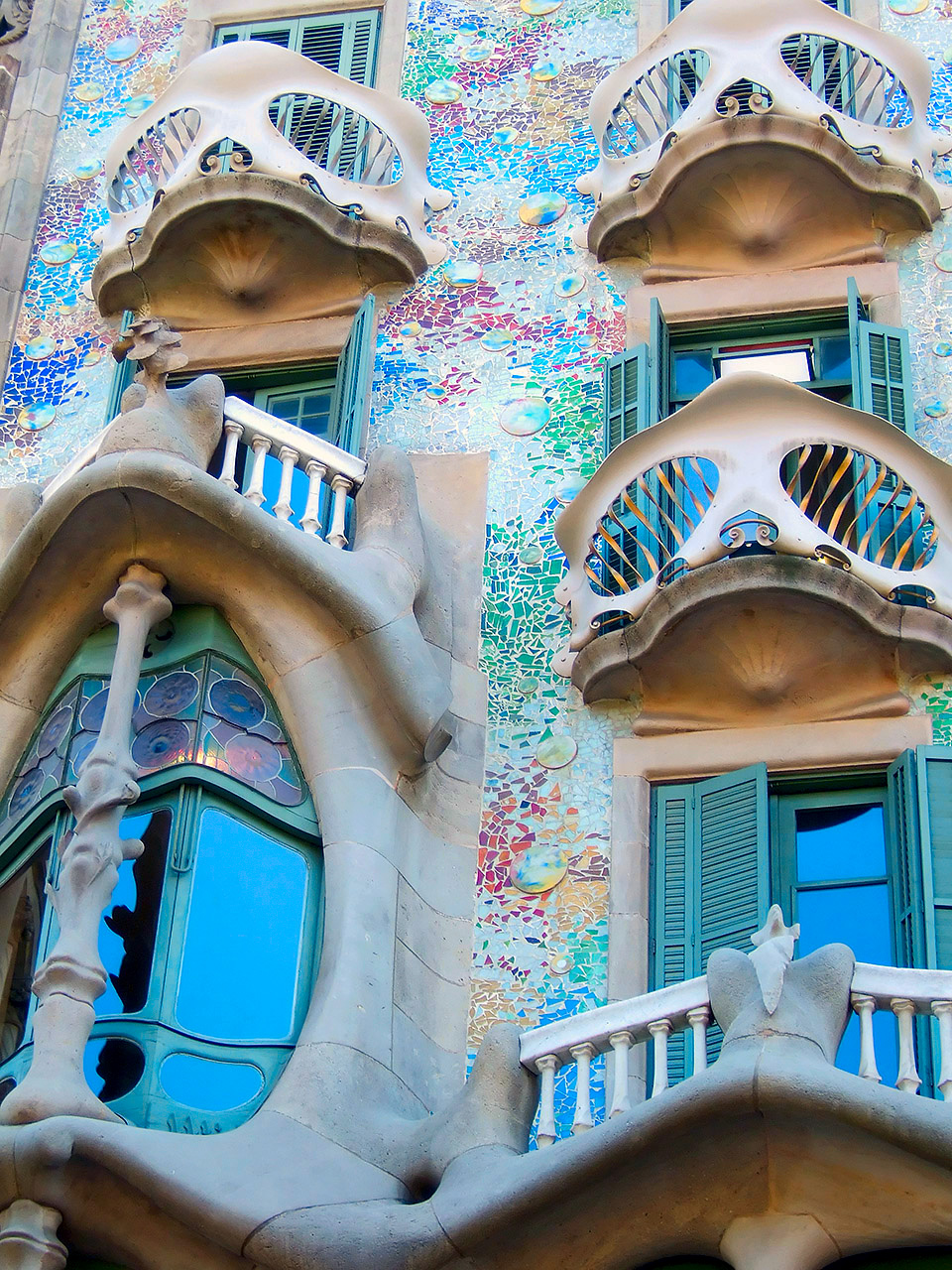 Gaudi's Casa Batllo in Barcelona, Spain. Fuji F11 Camera at ISO 200.